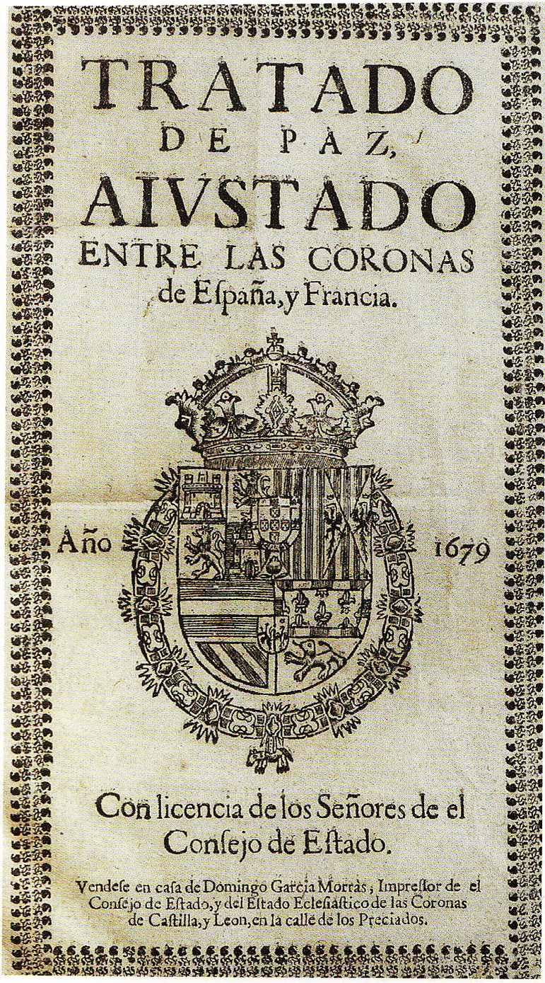 Tractat de pau de Nimega (1678) entre Espanya i França